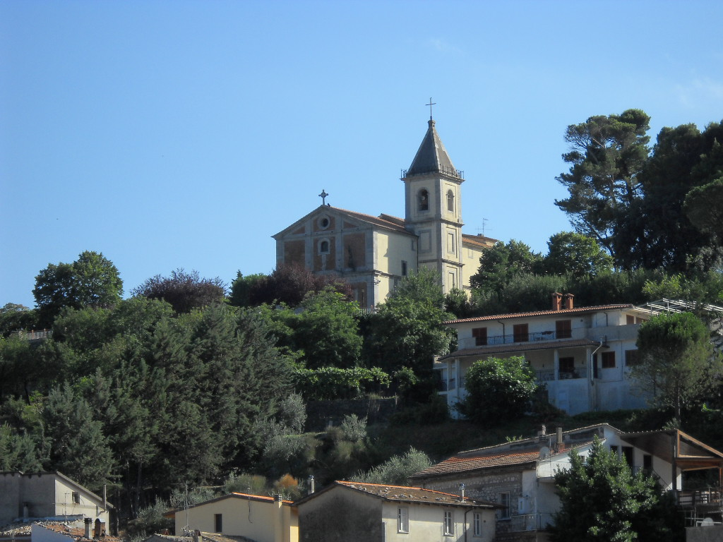 Santuario della Madonna del Colle (Maria Santissima del Colle)